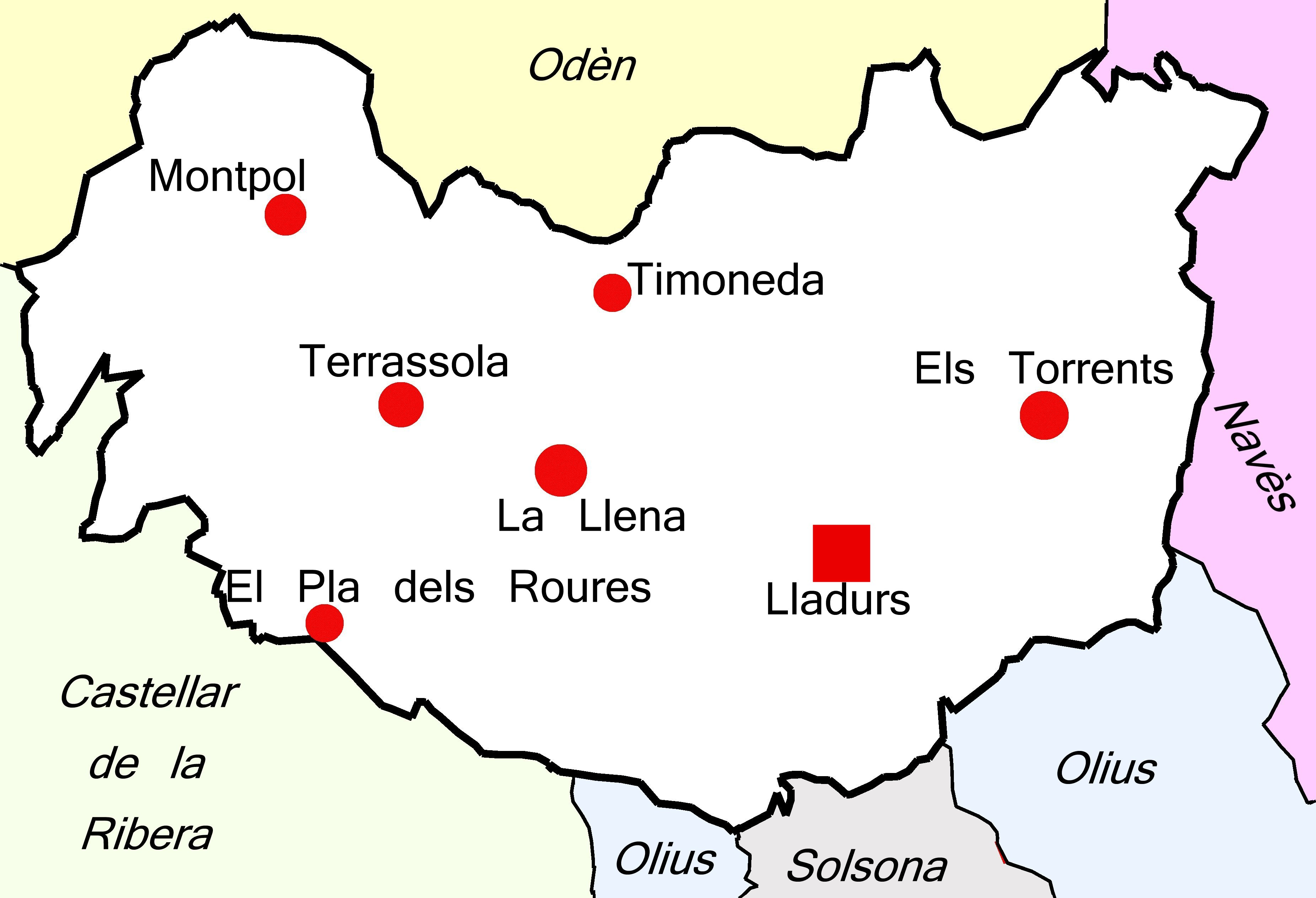 Mapa del municipi de Lladurs (Solsonès) amb els municipis limítrofes i les entitats de població.